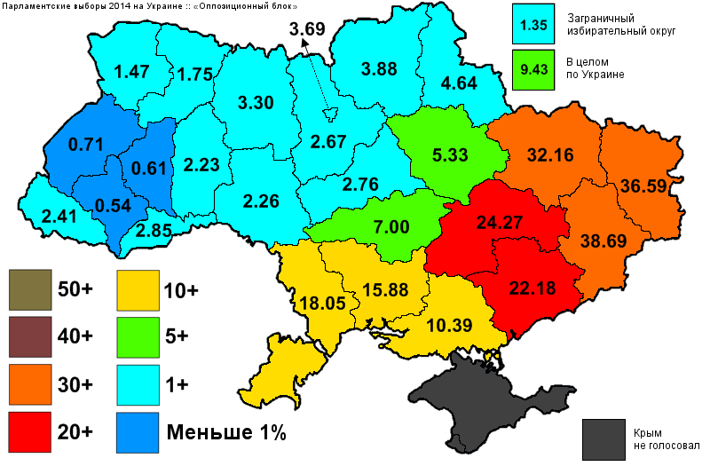 Результаты выборов в Верховную Раду Украины, которые состоялись 25 октября 2014 года. Информация с официального сайта ЦИК. Проценты по регионам для "Оппозиционного блока".